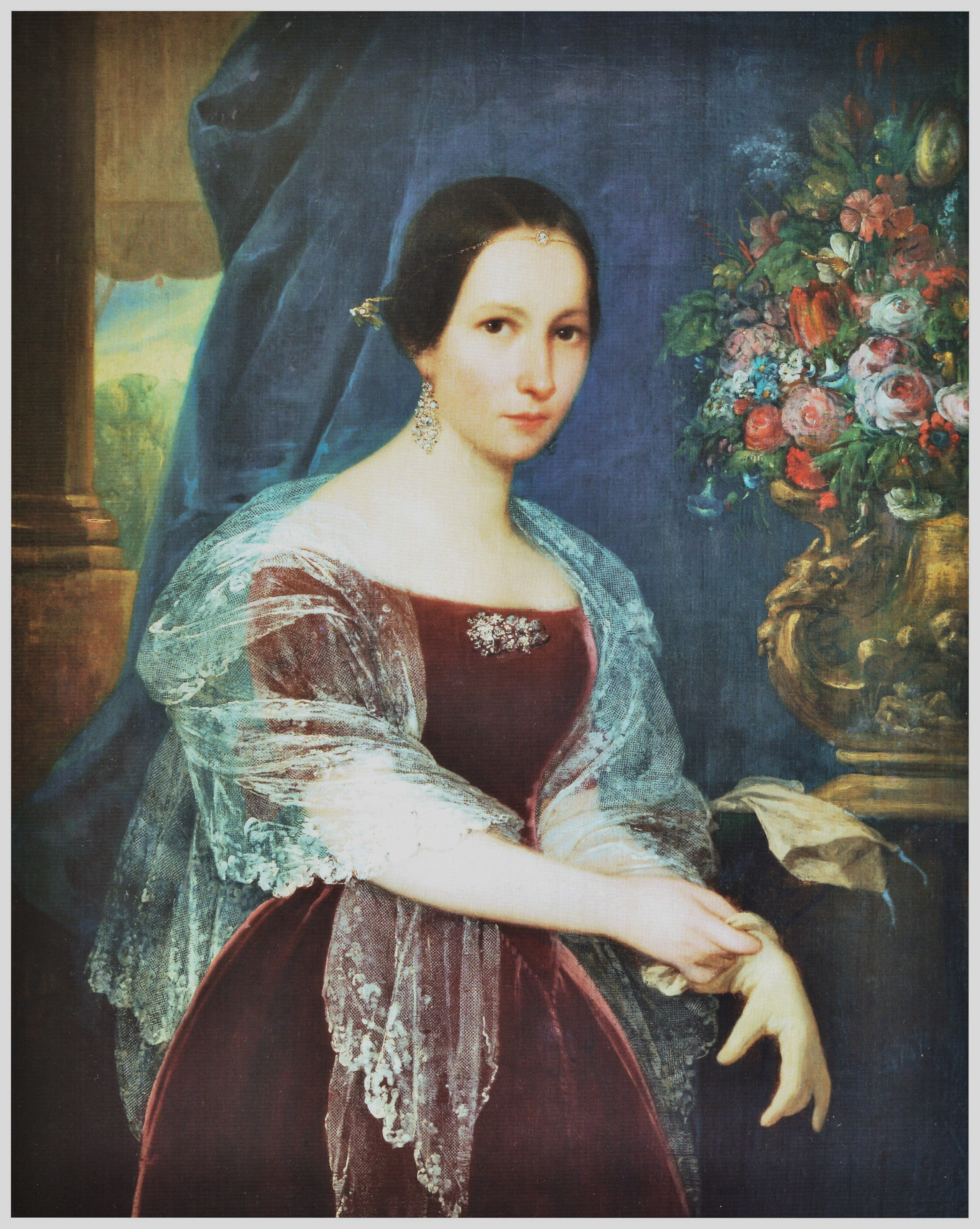 Retrato de Enriqueta Pinto Garmendia de Bulnes (1815-1904), esposa del presidente Manuel Bulnes